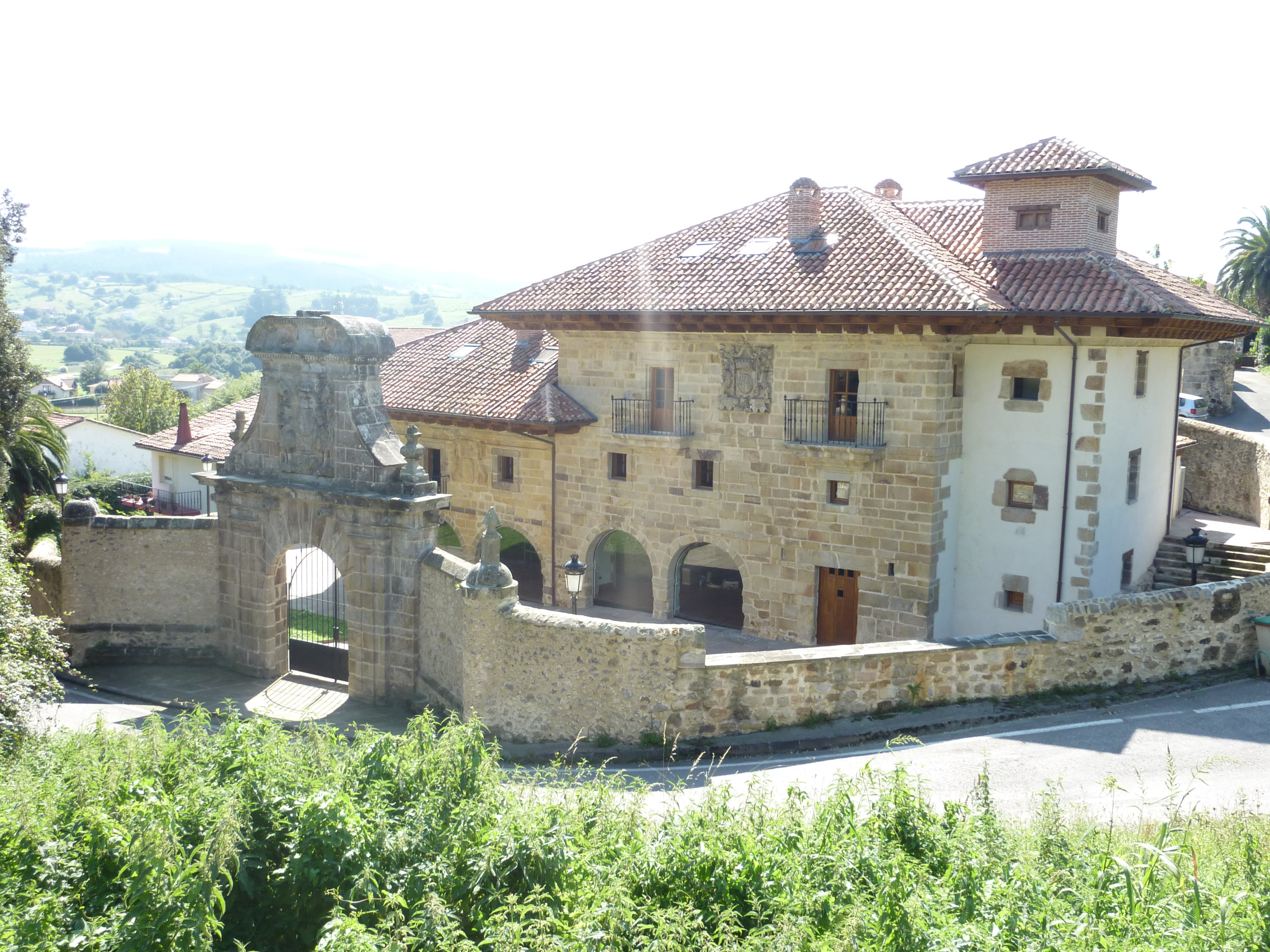 palacio.